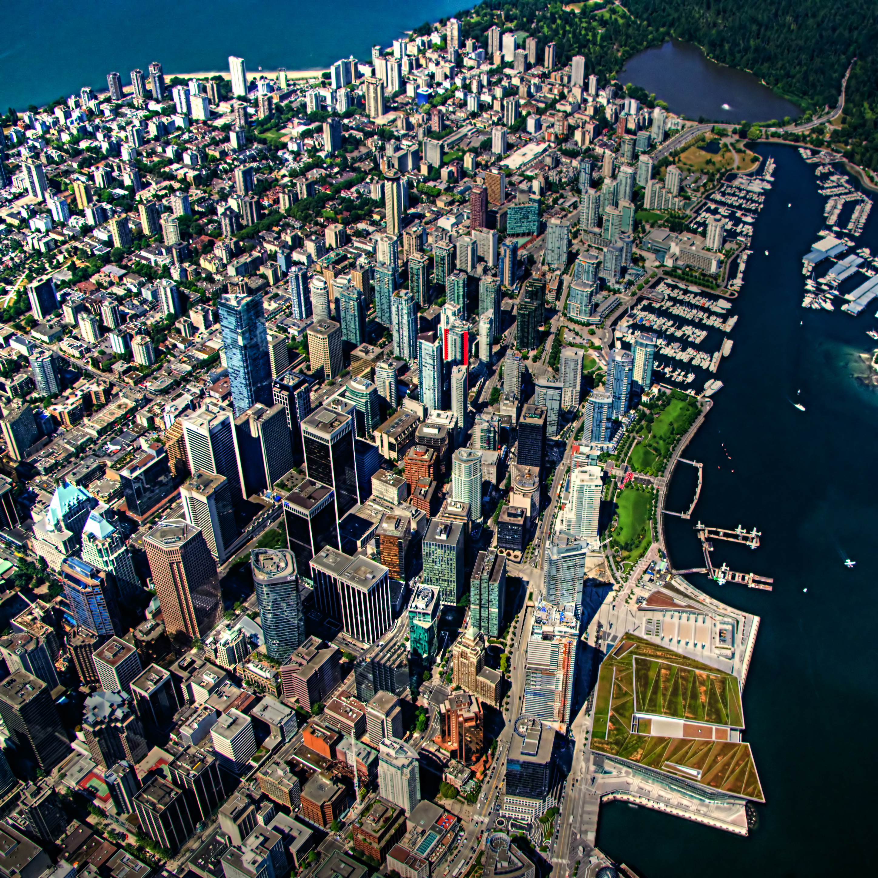 Vancouver aerial view